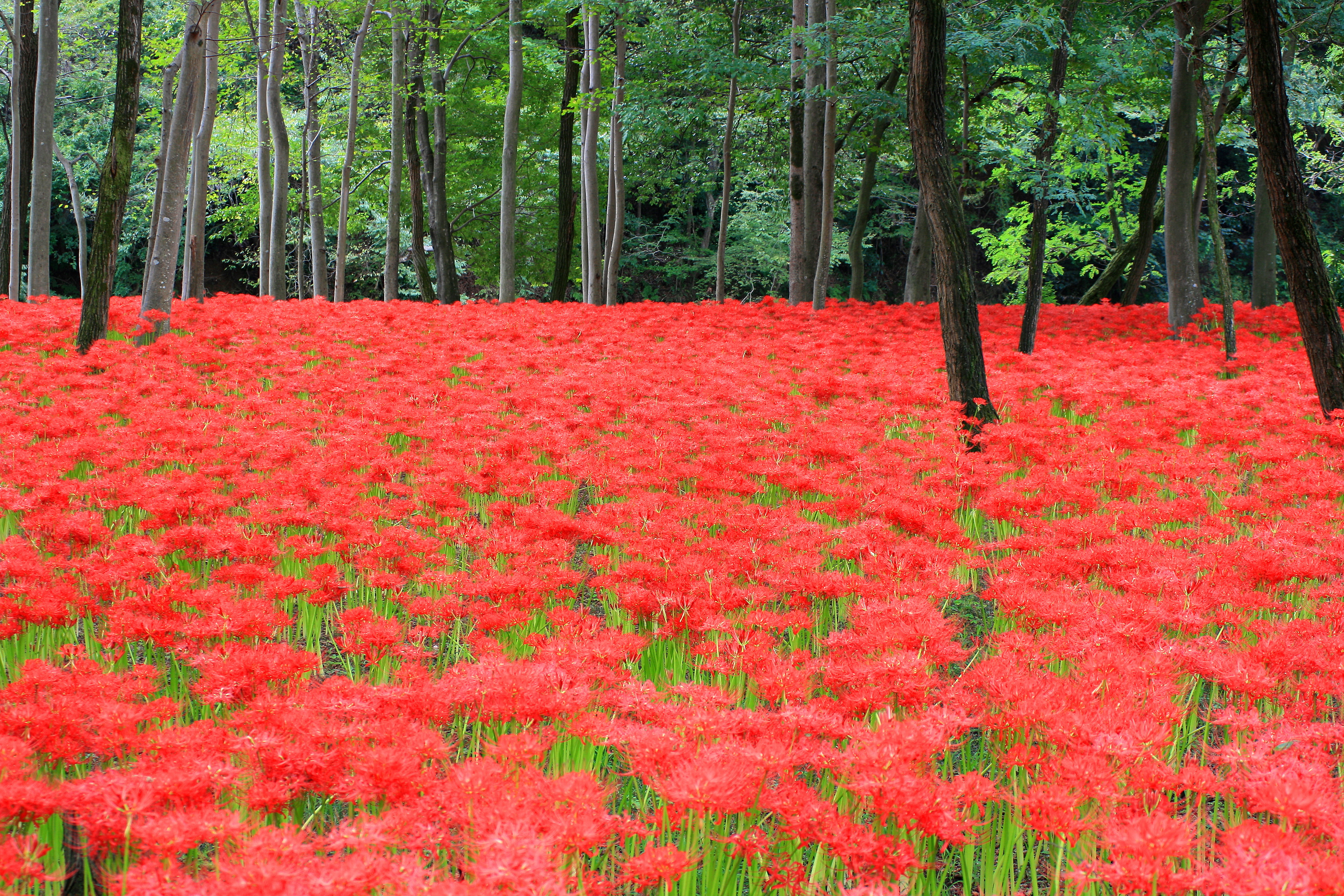 巾着田に群生する曼珠沙華（彼岸花）（埼玉県日高市）